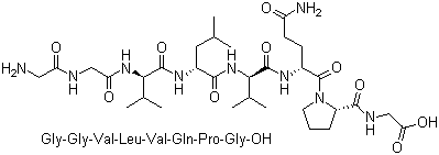 Representación de la cadena peptídica del Acetato de Lazarotide